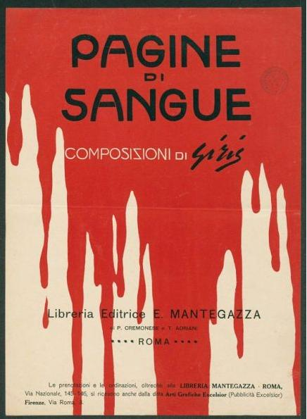 Pagine di Sangue, album de César Giris comprenant 17 lithogravures sur les désastres de la Première Guerre mondiale, imprimé à Rome en 1916 chez Mantegazza.